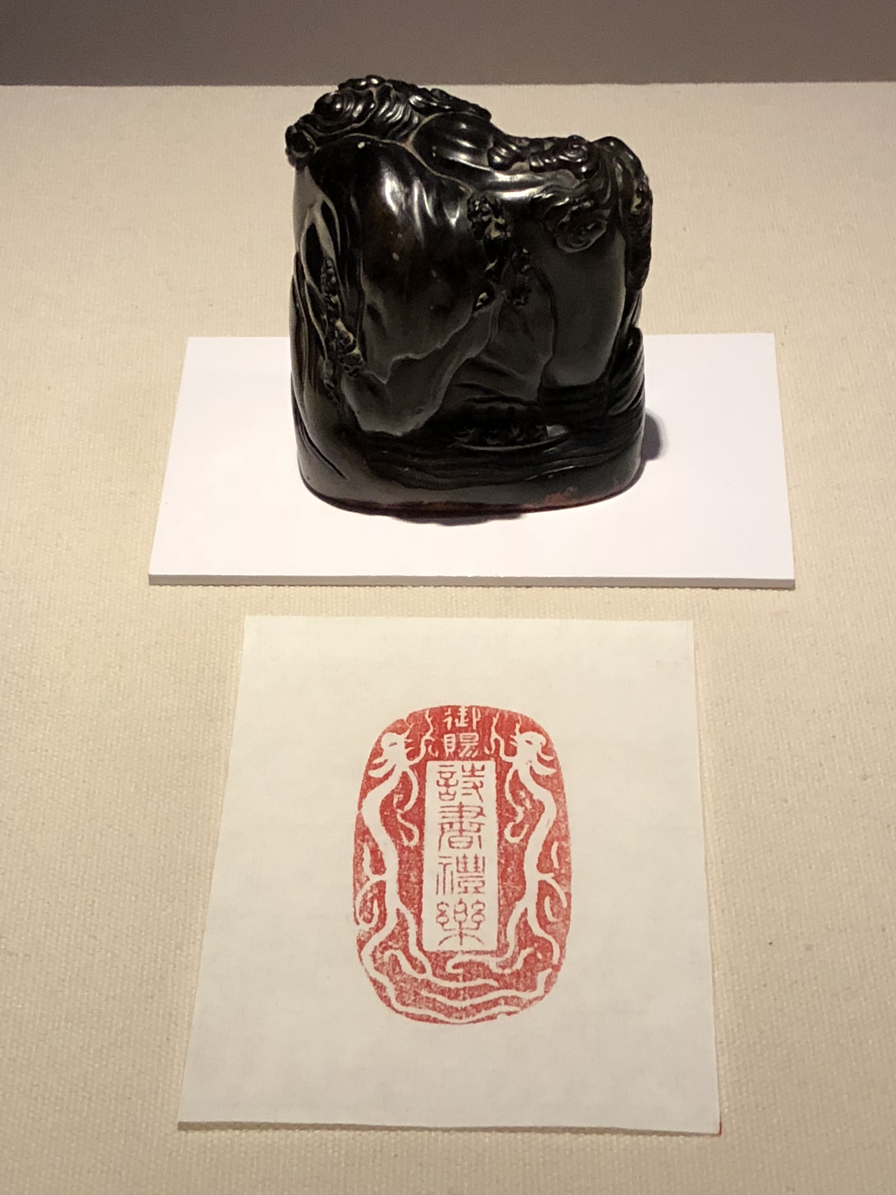 孔府旧藏 明代 印面椭圆 阳刻篆书“御赐诗书礼乐” 一级文物